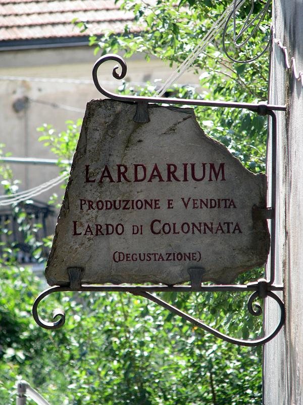 Insegna tipica a Colonnata frazione di Carrara in Toscana - Italia.